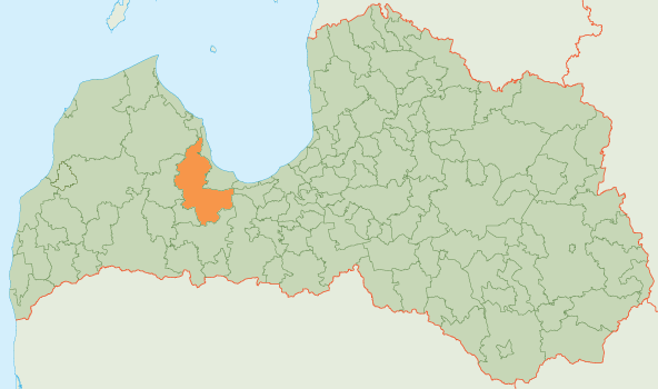 Tukuma novada karte